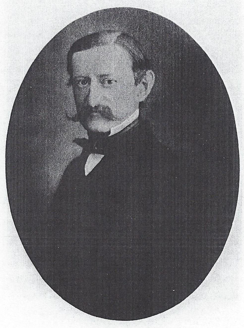 Porträtfotograie von Julius Alexander von Jagow (1825-1897)